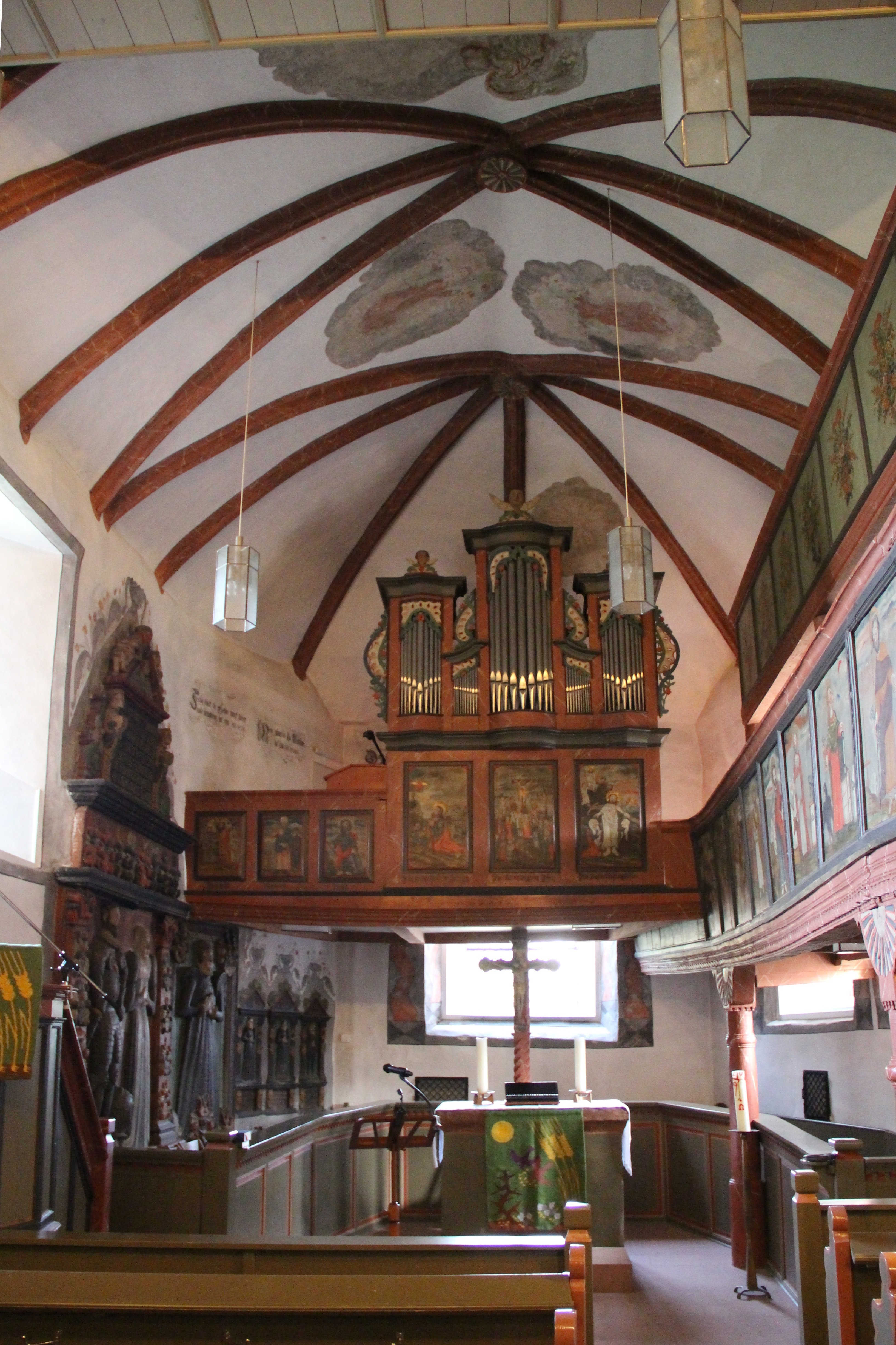 Kirche Salzböden